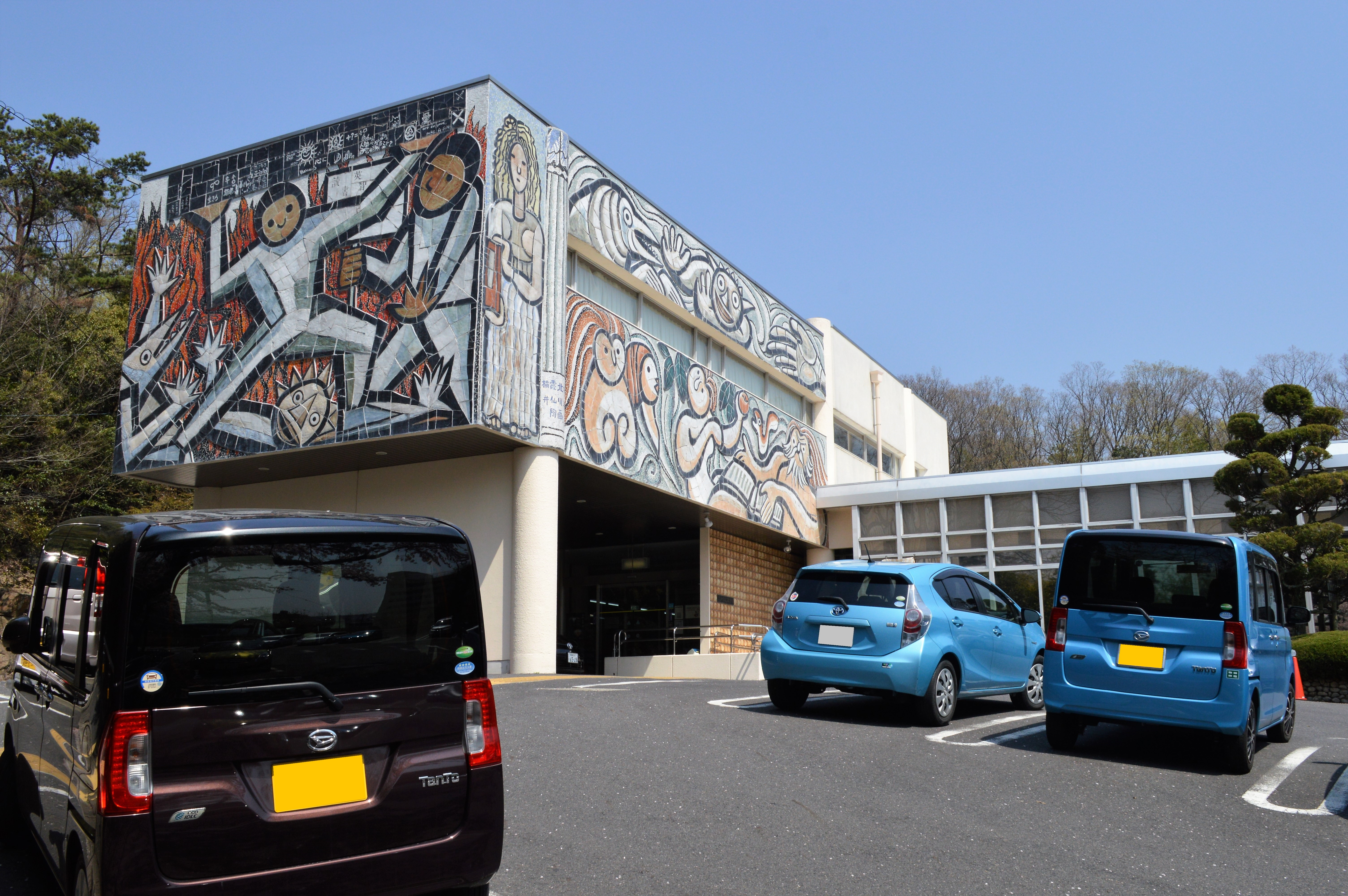 愛知県瀬戸市の瀬戸市立図書館。車のナンバープレート部分は修正してある。